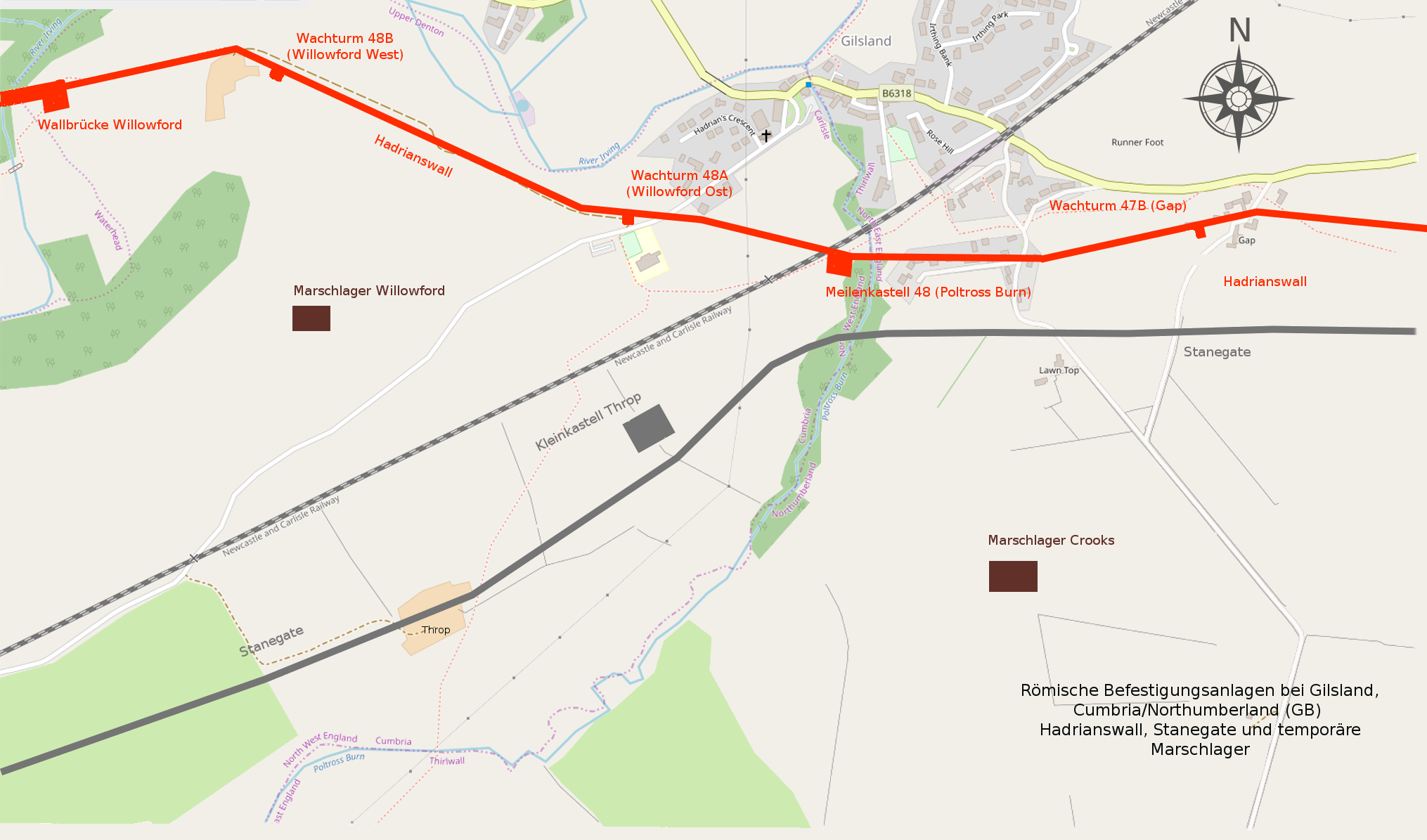 Römische Befestigungen des 2. Jahrhunderts n.Chr. bei Gilsland (GB), Hadrianswall, Stanegate und temp. Marschlager.